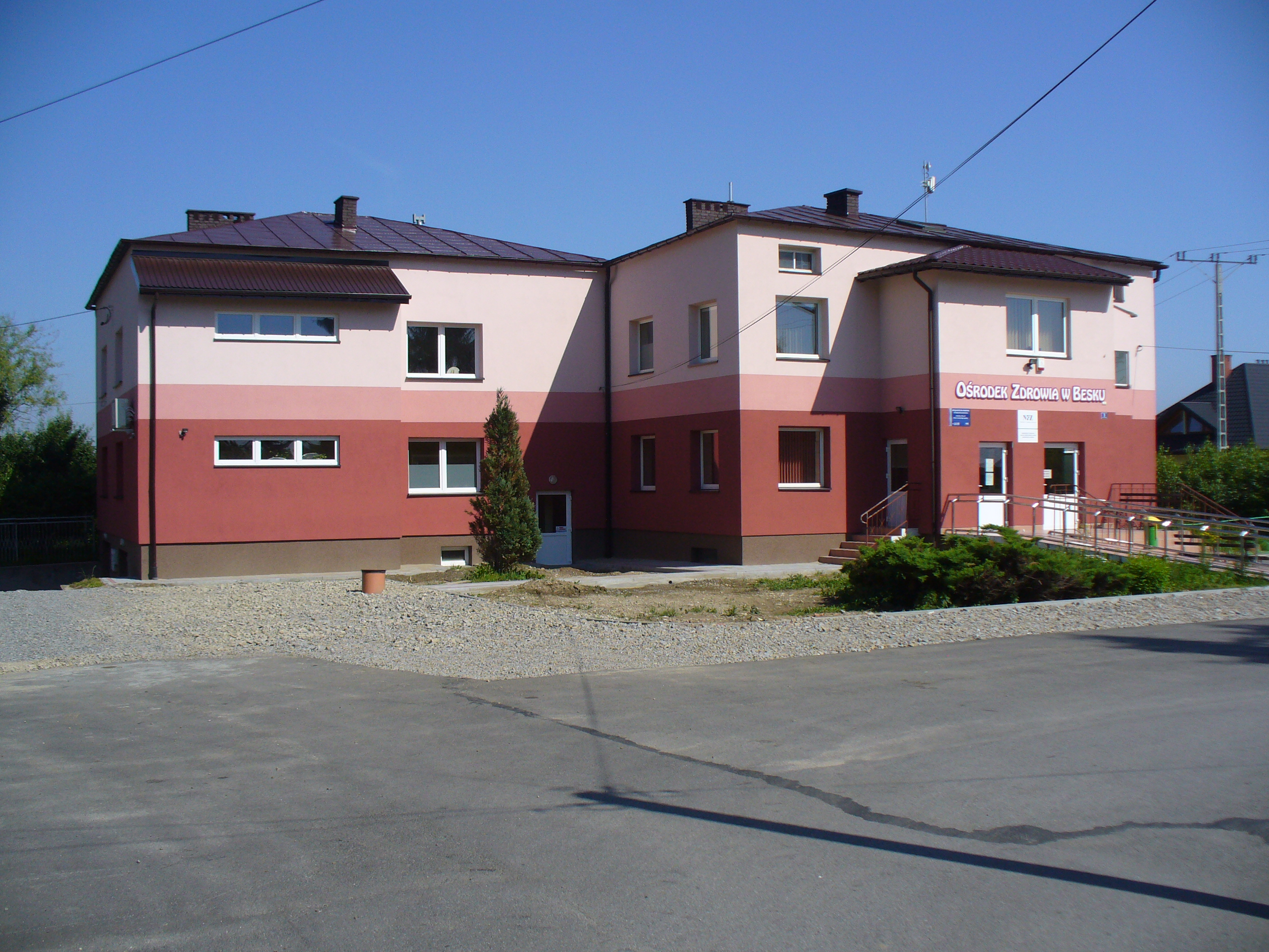 Besko osrodek zdrowia